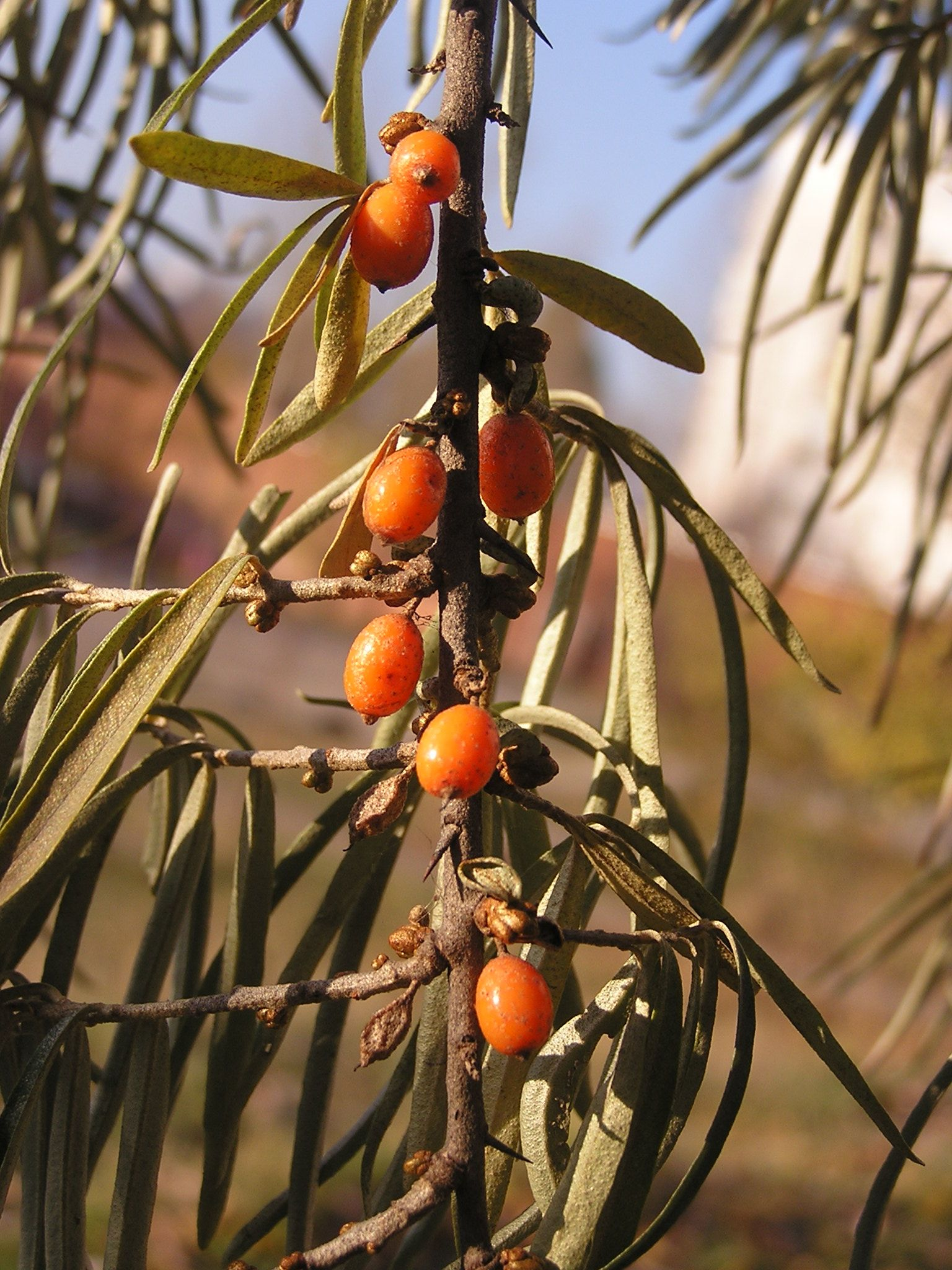 Растение